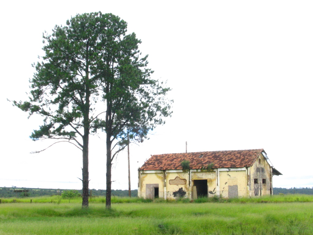 foto tirada na rodovia Washington Luís, município de São Carlos - SP